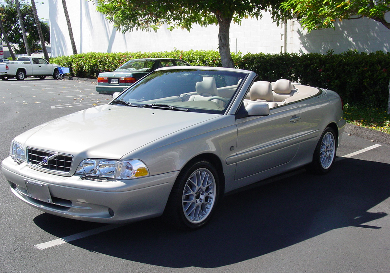 Volvo C70 Cabriolet année 2003 Description Volvo C70 de 2003 Source Photo perso